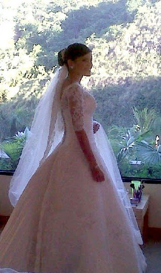 Novia